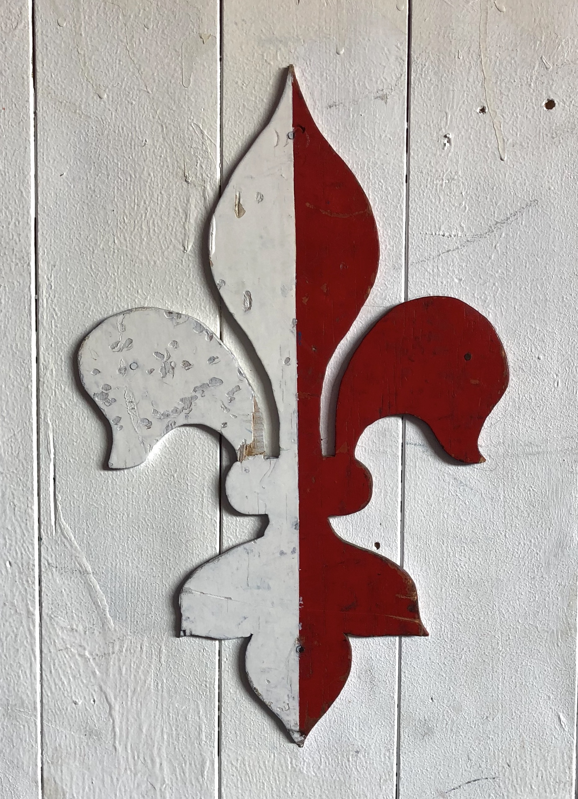 rechts: Pfadfinderlilie aus der Schweiz